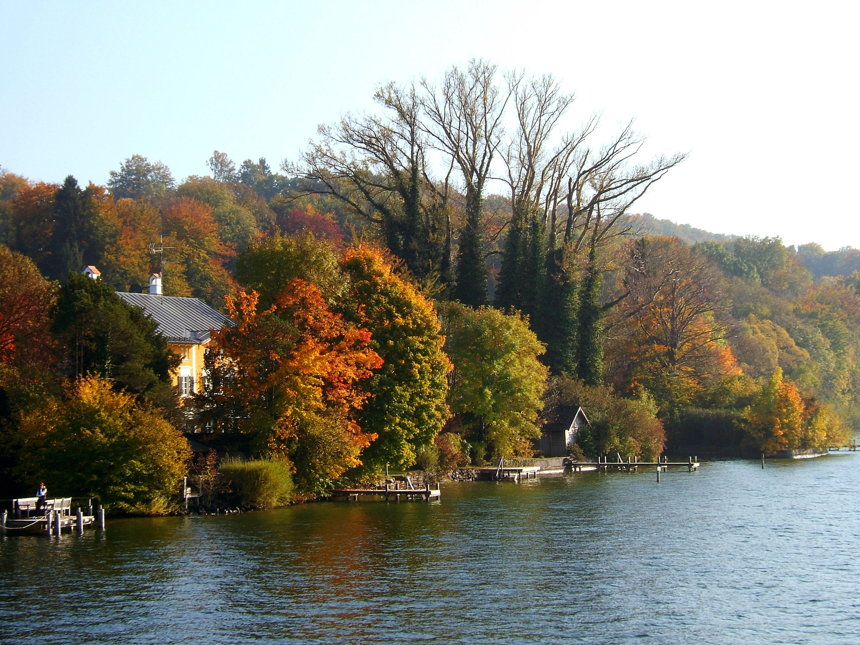 Leoni (Teil der Gemeinde Berg) am Ost-Ufer des Starnberger Sees, vom Schiff aus aufgenommen. Im Haus befinden sich die Büroräume von Haus Buchenried (Münchner Volkshochschule)